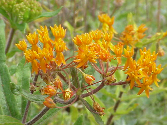 Species: Asclepias tuberosa Family: Asclepiadaceae Image No. 1